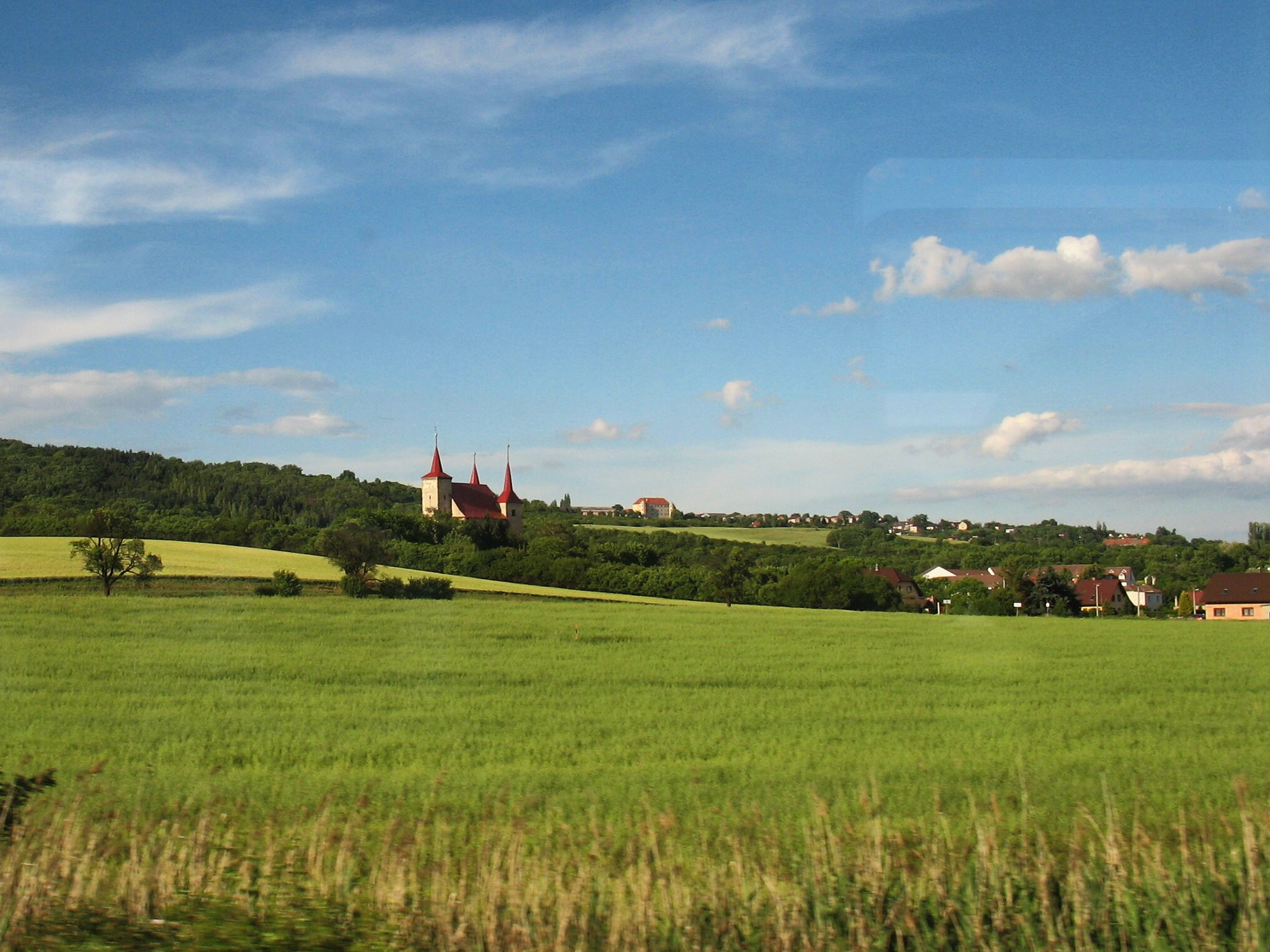 Sýčina s kostelem sv. Václava